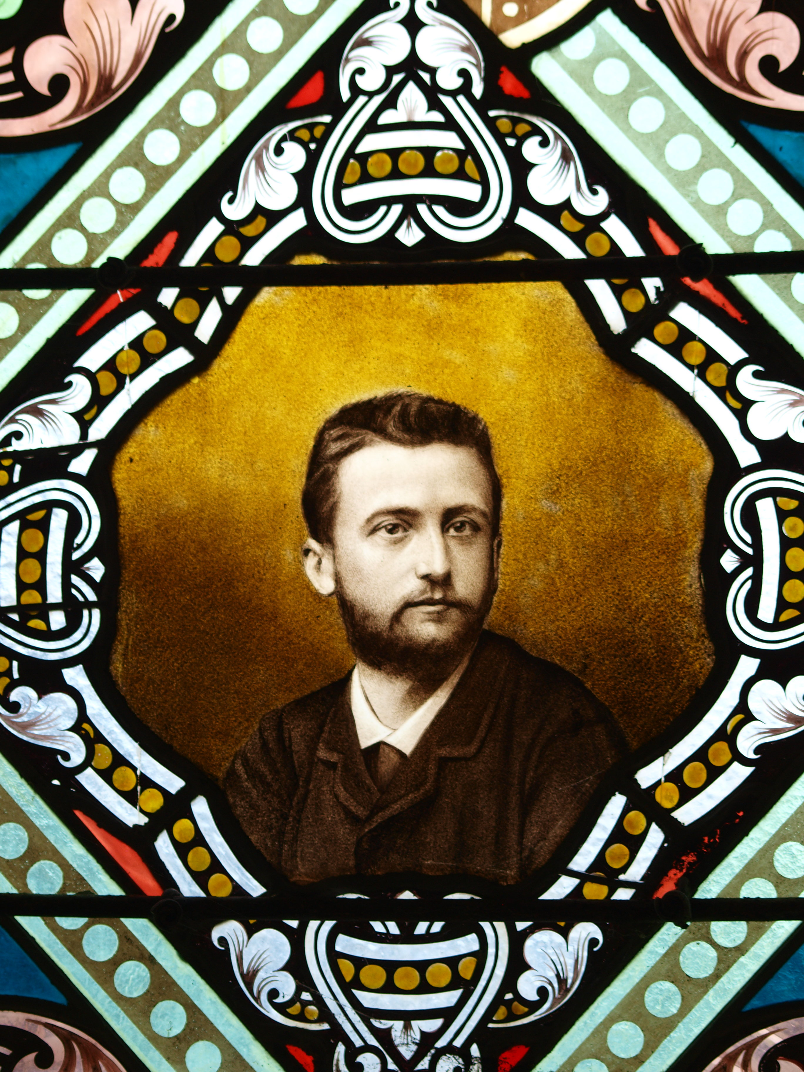 L'un des vitraux de l'église de Louvergny (Ardennes, France)- Hippolyte Noiret, normalien, membre de l'École française de Rome, décédé prématurément à Venise, à la mémoire duquel son père, un riche filateur de Rethel, originaire de Louvergny, fit élever, sur ses propres deniers, l'église de Louvergny.